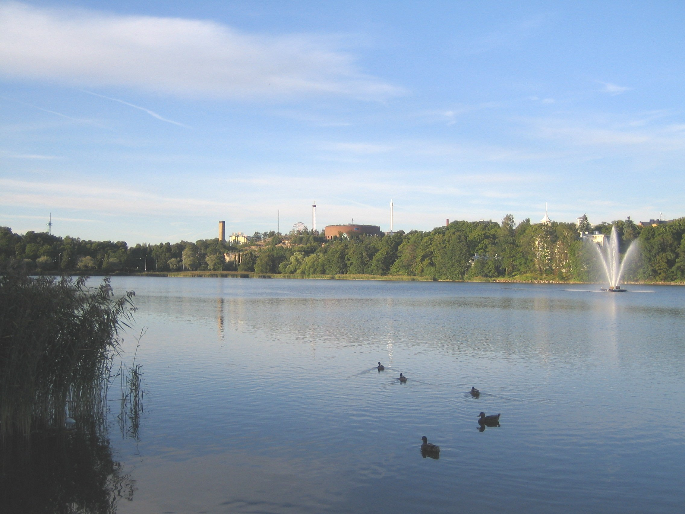 Töölönlahti bay, Helsinki, Finland. Photo taken by the uploader.